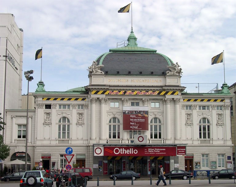 Hamburg, Germany: Deutsches Schauspielhaus